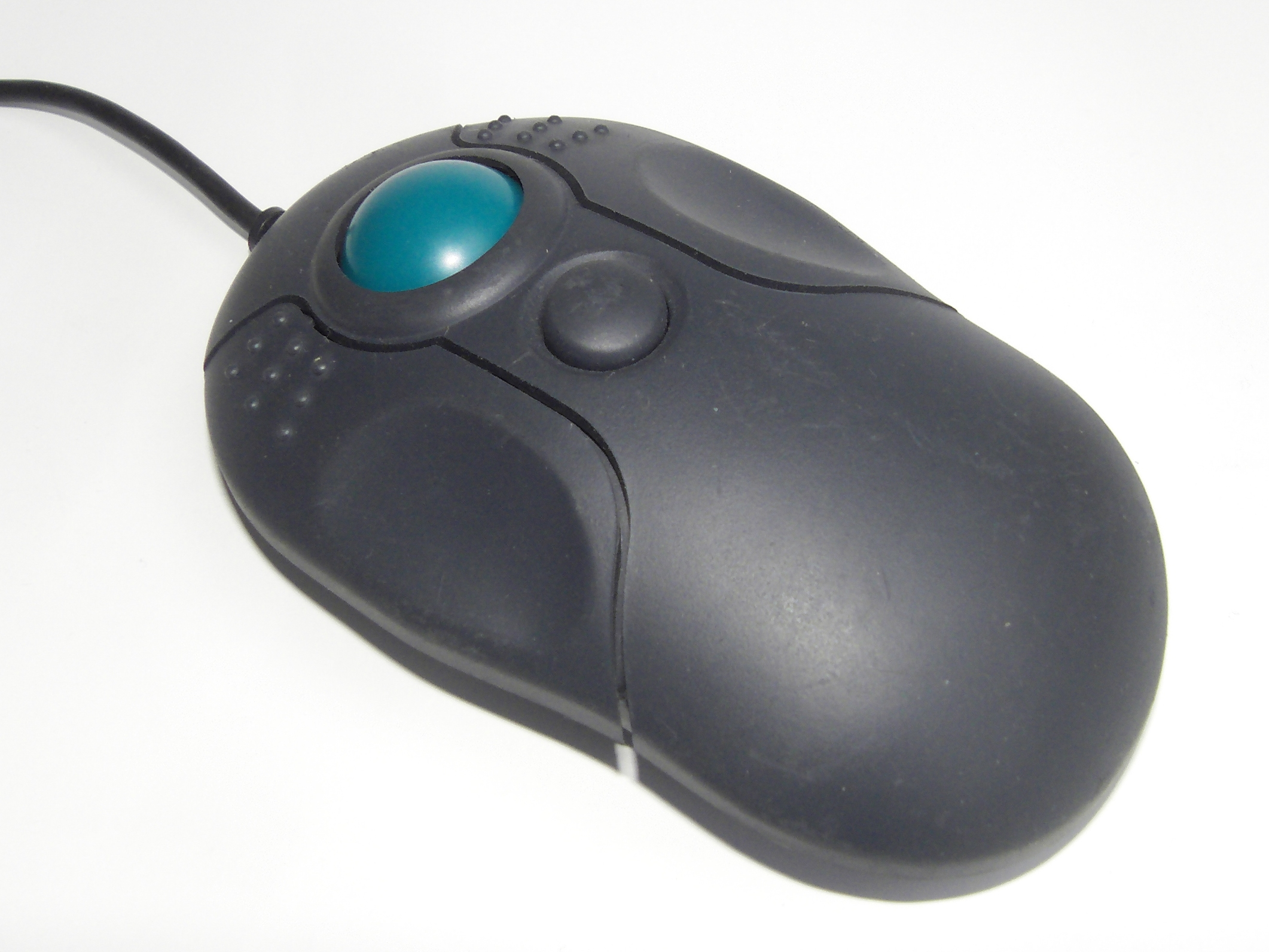 Compurtermaus mit Rollkugel